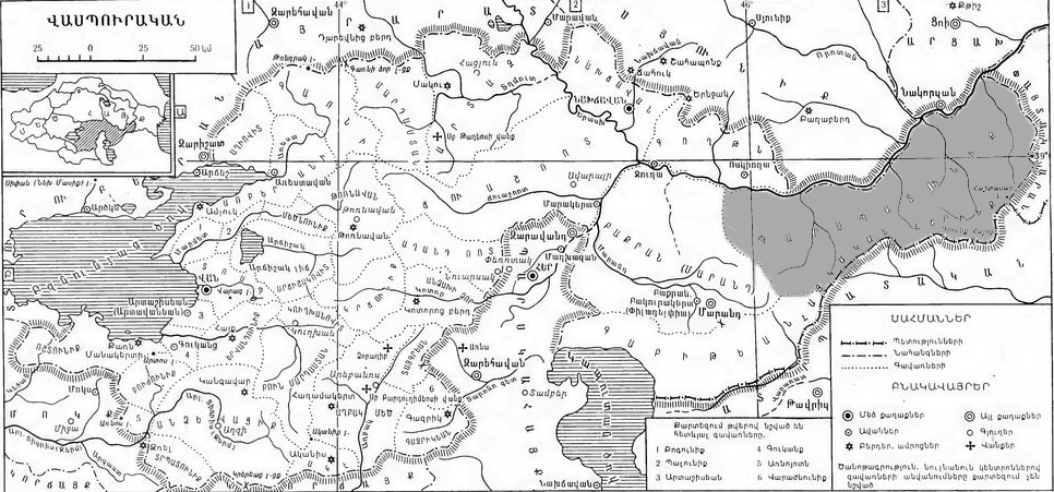 Վասպուրական